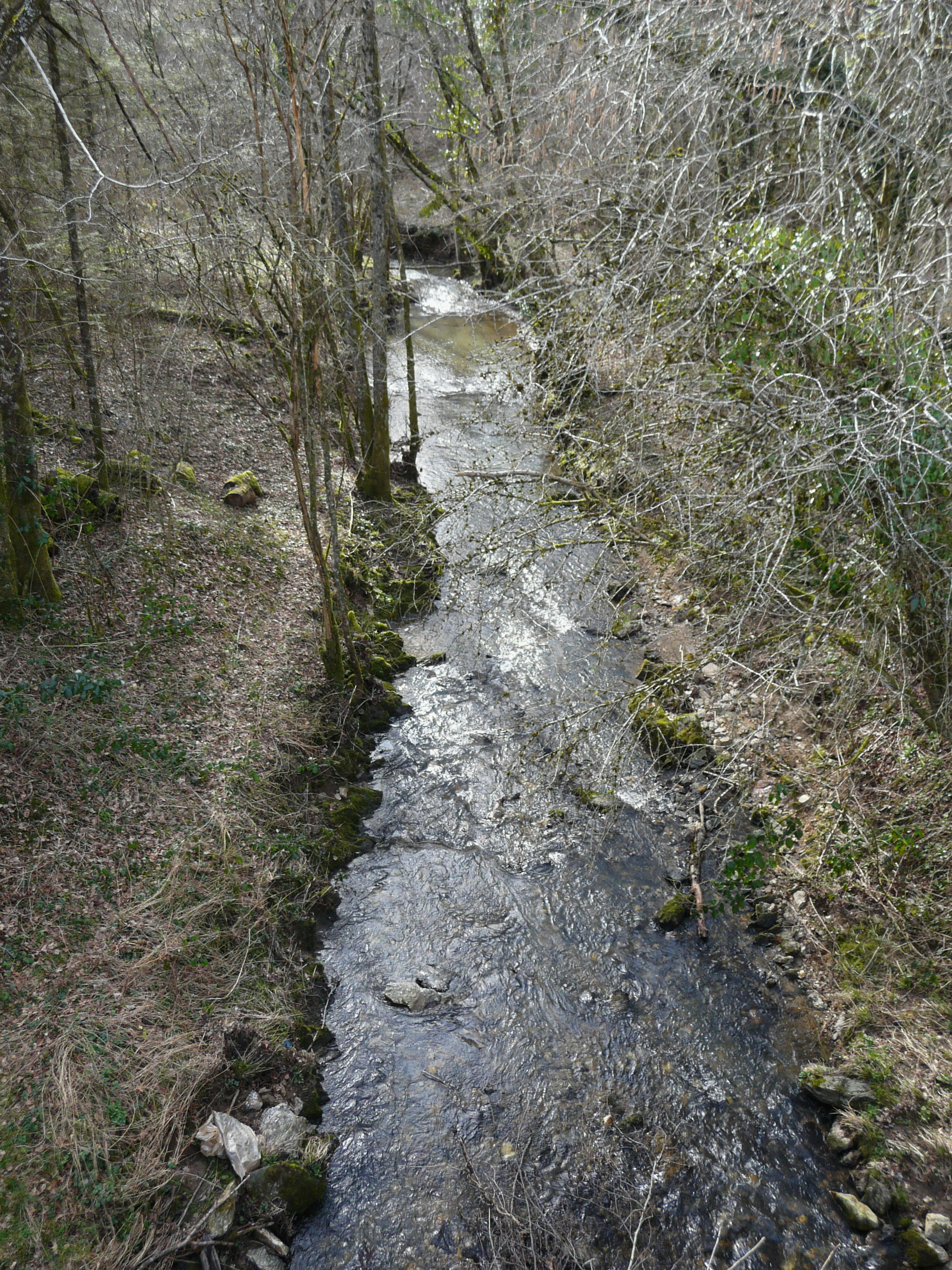 Le ruisseau de la Penchennerie en aval du pont de la RD 6, en limite des communes de Saint-Éloy-les-Tuileries et de Ségur-le-Château, Corrèze, France